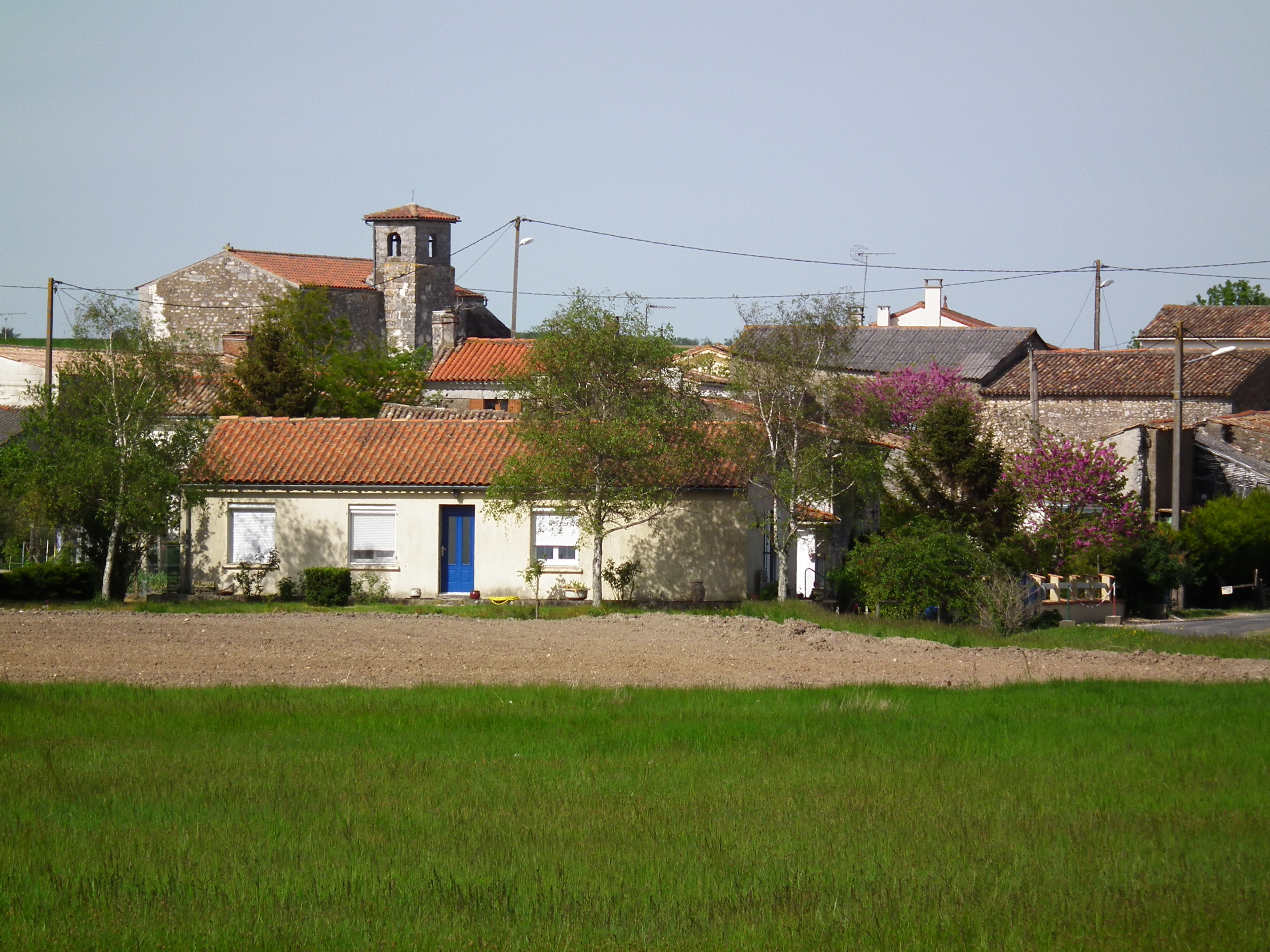 Saint-Romain-sur-Gironde